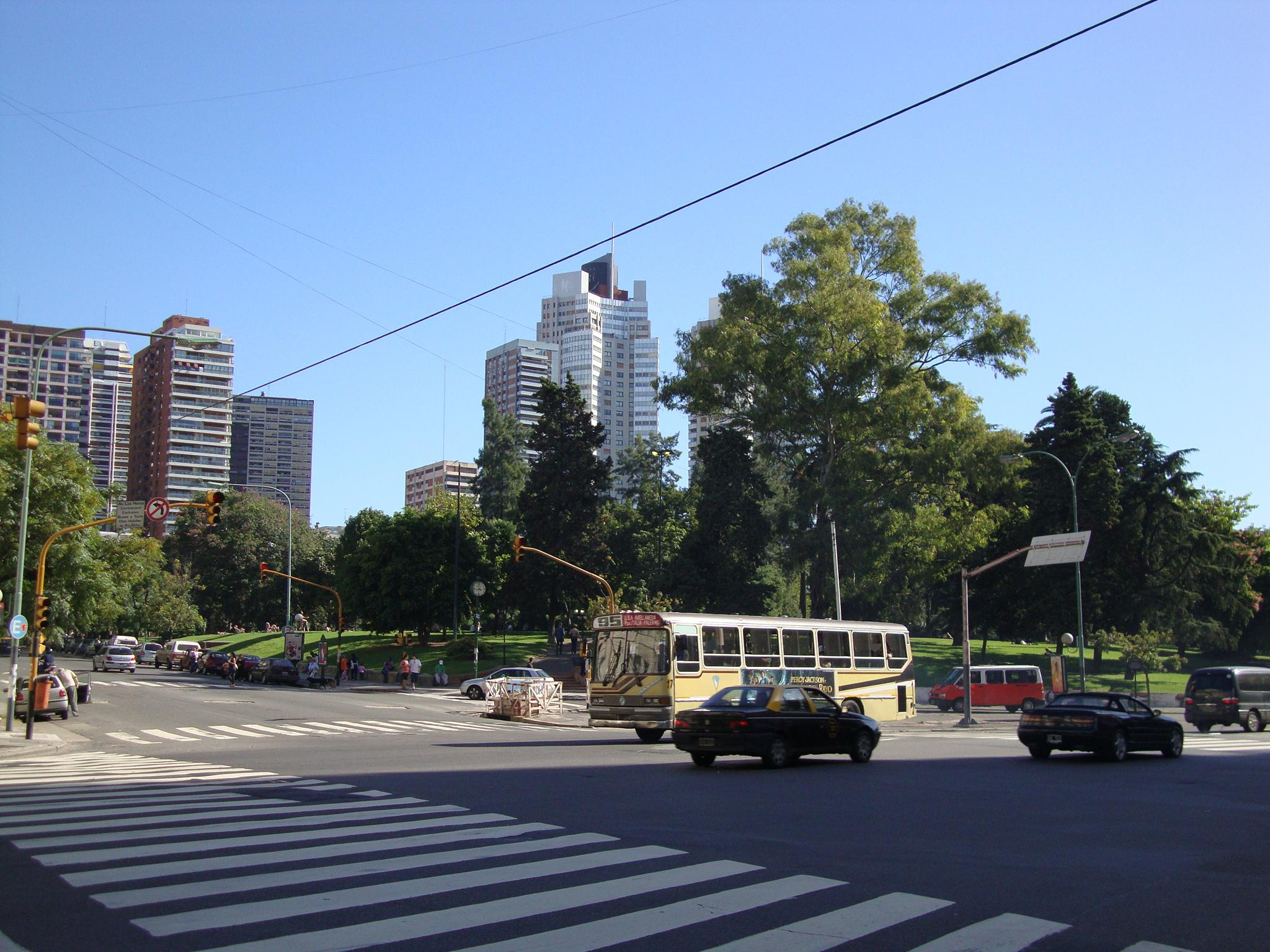 Vista desde el cruce de las avenidas Las Heras y Coronel Díaz del Parque Las Heras. Allí funcionó hasta 1961 la Penitenciaría Nacional, como recuerdan varias placas colocadas en distintos puntos en memoria de distintos presos célebres. Al fondo, se destacan las Torres Alto Palermo. Buenos Aires, Argentina.